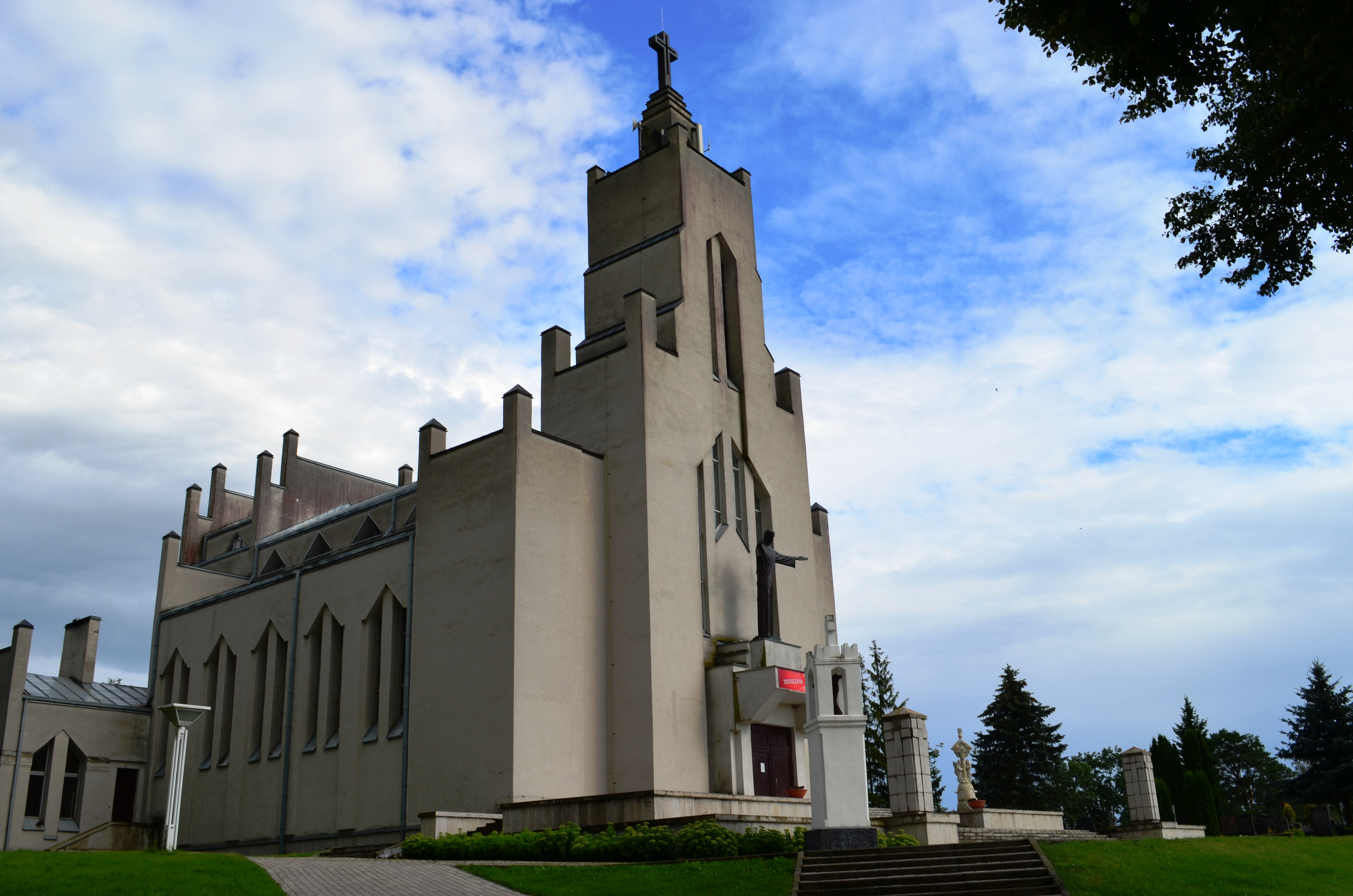 Truskava, Kėdainių raj.